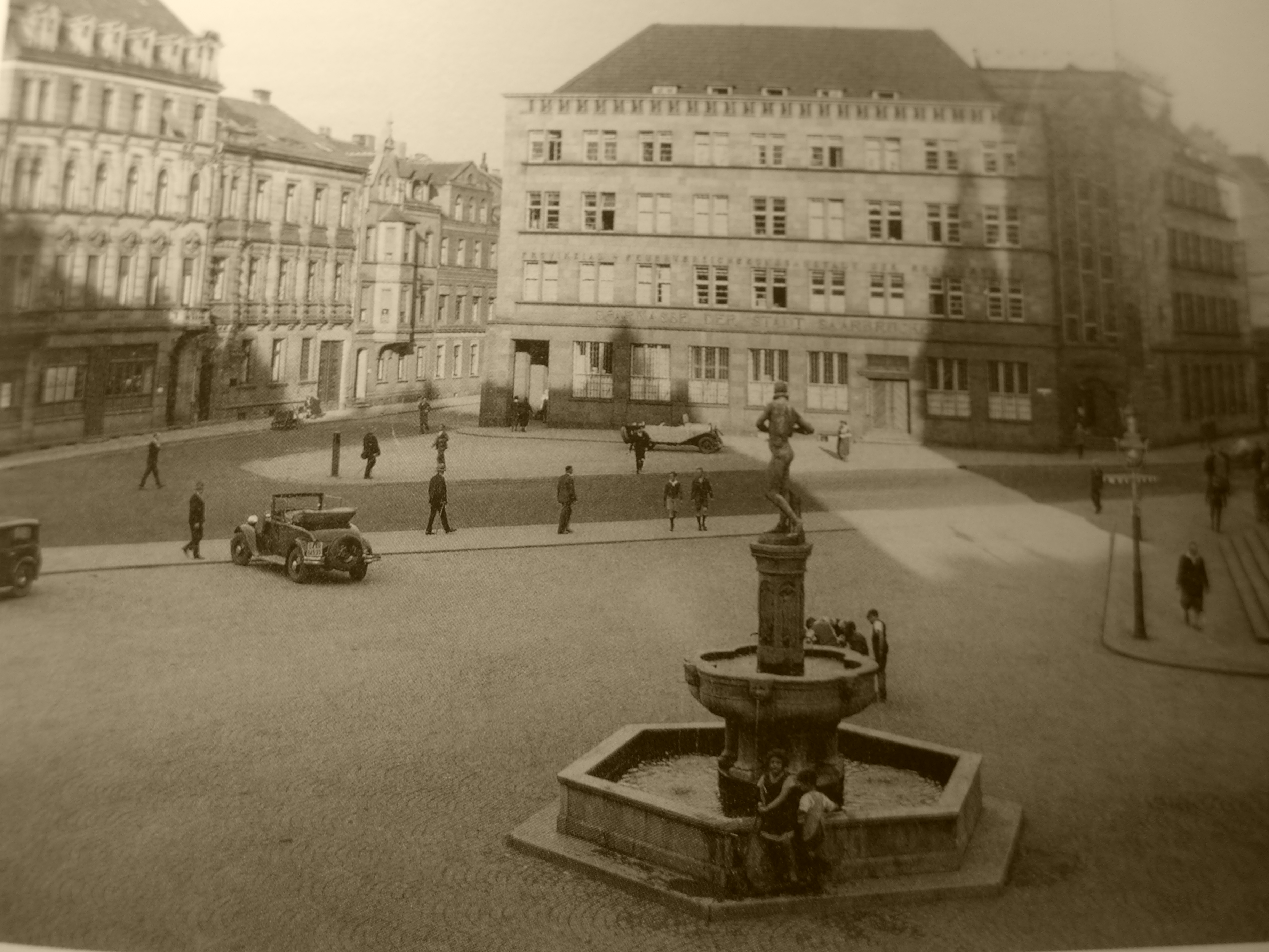 Rathausplatz St. Johann, Telemachbrunnen mit Blick zur Stadtsparkasse (Stadtarchiv Saarbrücken)